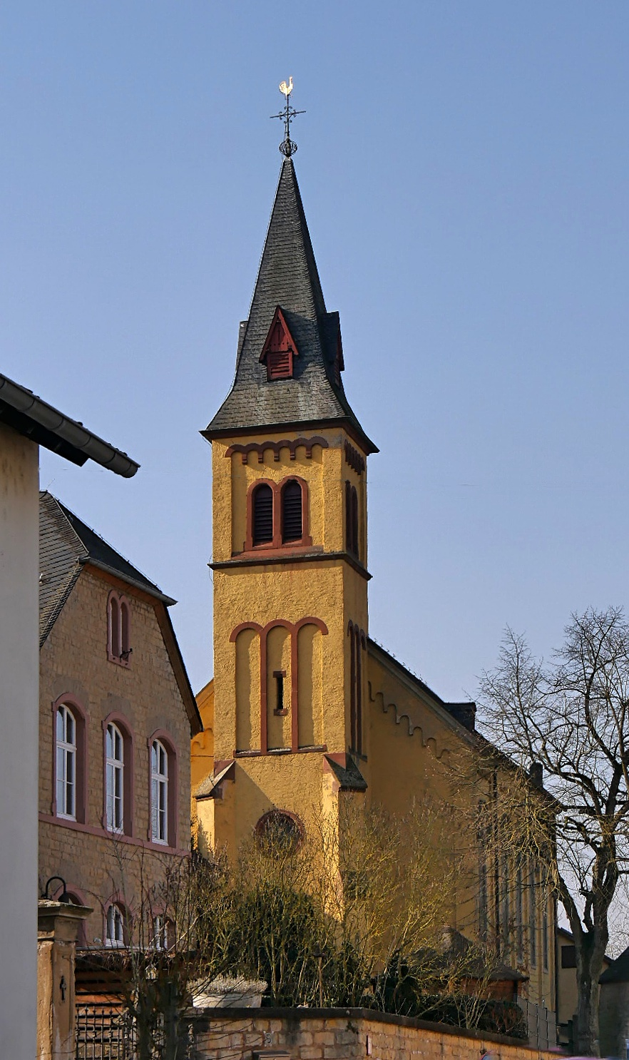 Oberbillig, Kirche Hl Barbara